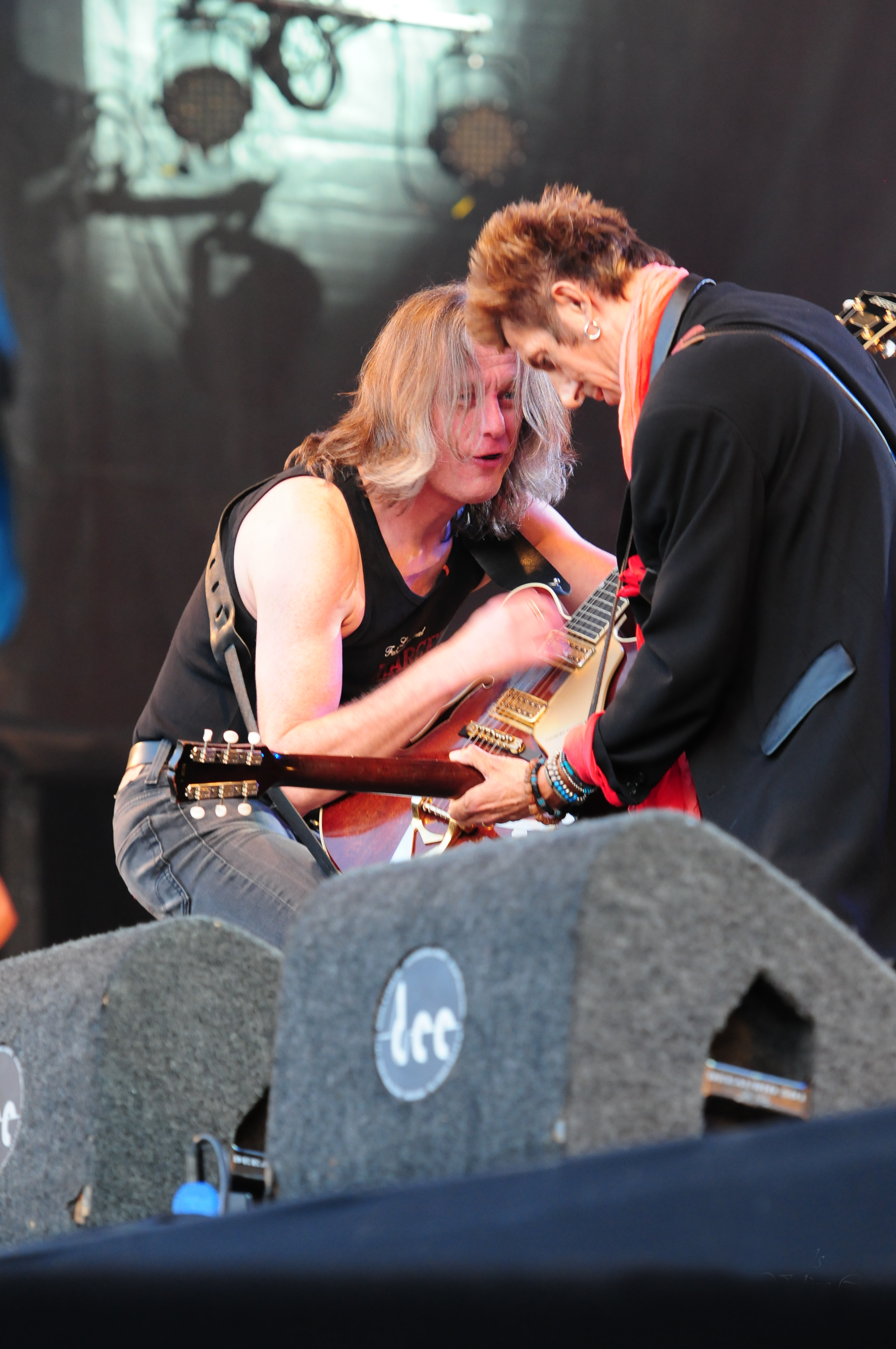 Optreden van "The Scabs" te Hemiksem op het "Casa Blanca Festival".